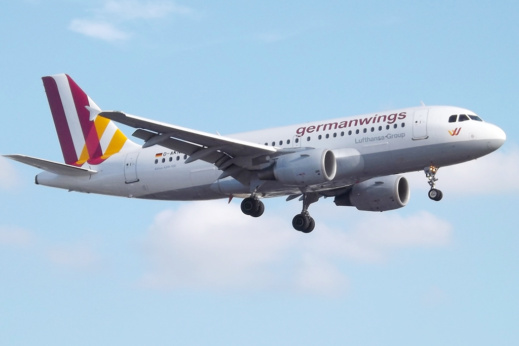 D-AKNF A319 Germanwings